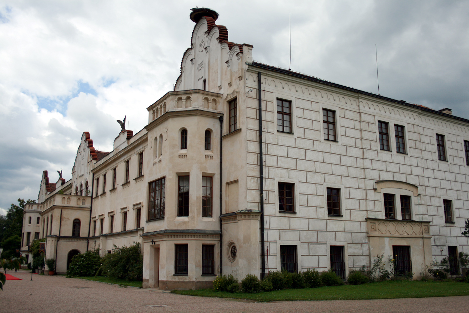 Častolovice castle, east Bohemia, Czech republic zámek Častolovice, východní Čechy photo July 2007 Author= Karelj